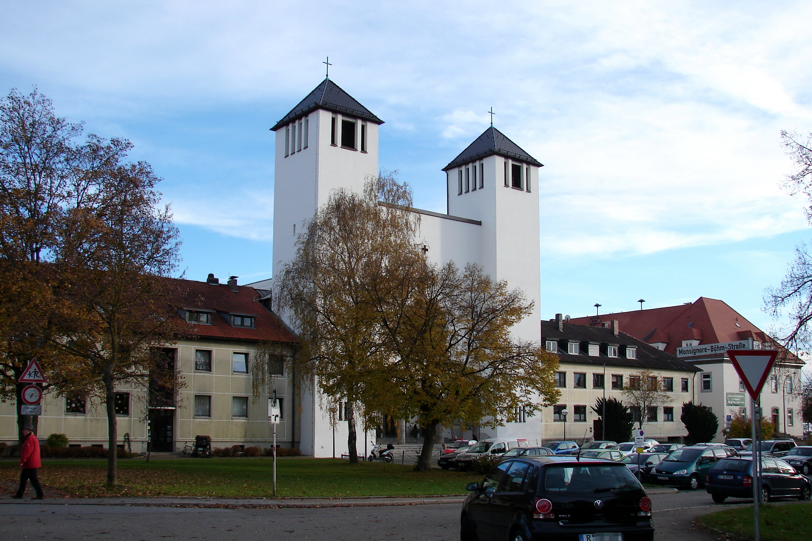 St.-Michaels-Platz mit Kath. Pfarrkirche St. Michael